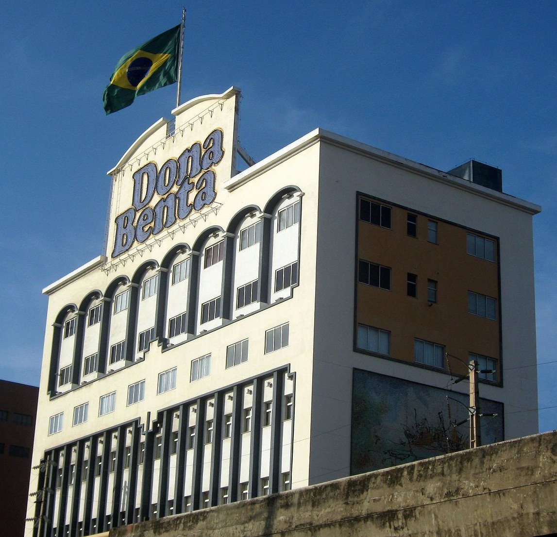 Prédio Sede do Grupo J. Macêdo